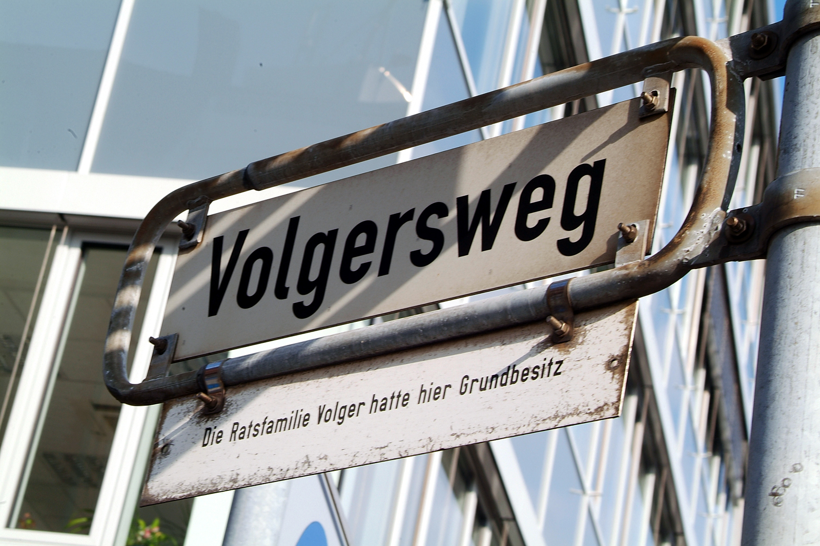 Straßenschild Volgersweg in Hannover Ecke Berliner Allee mit dem Zusatz-Schild "Die Ratsfamilie Volger hatte hier Grundbesitz" ...